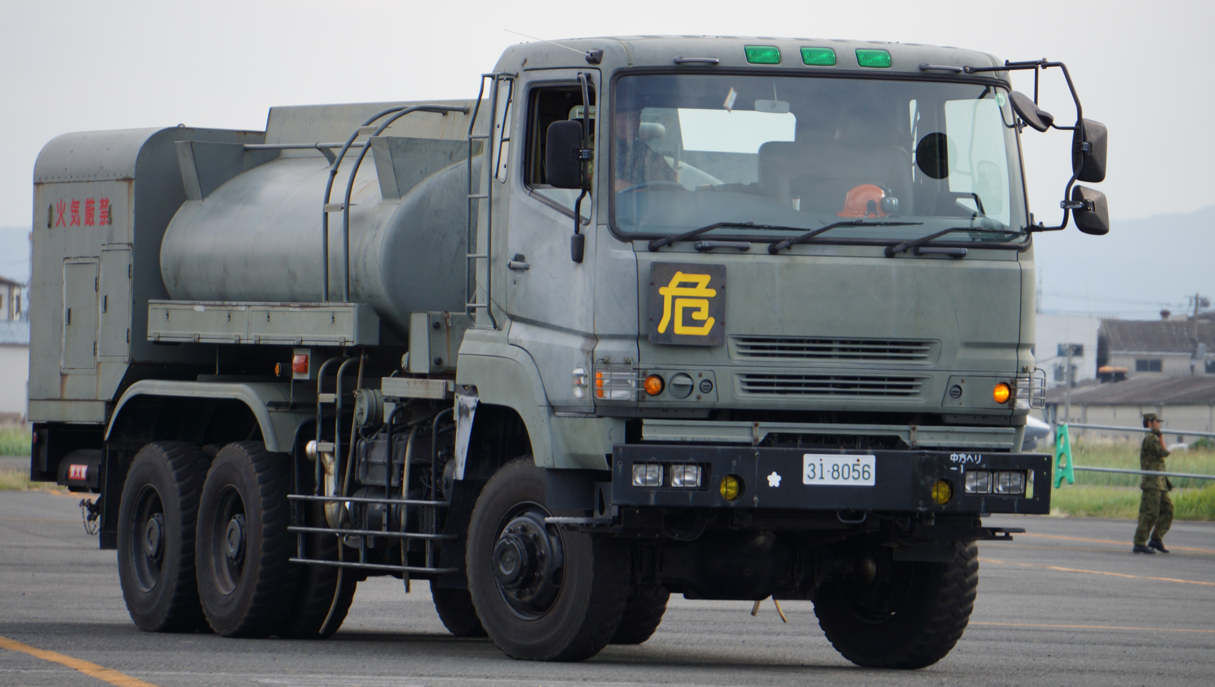 10000リットル燃料タンク車 12年10月6日 陸上自衛隊八尾駐屯地にて